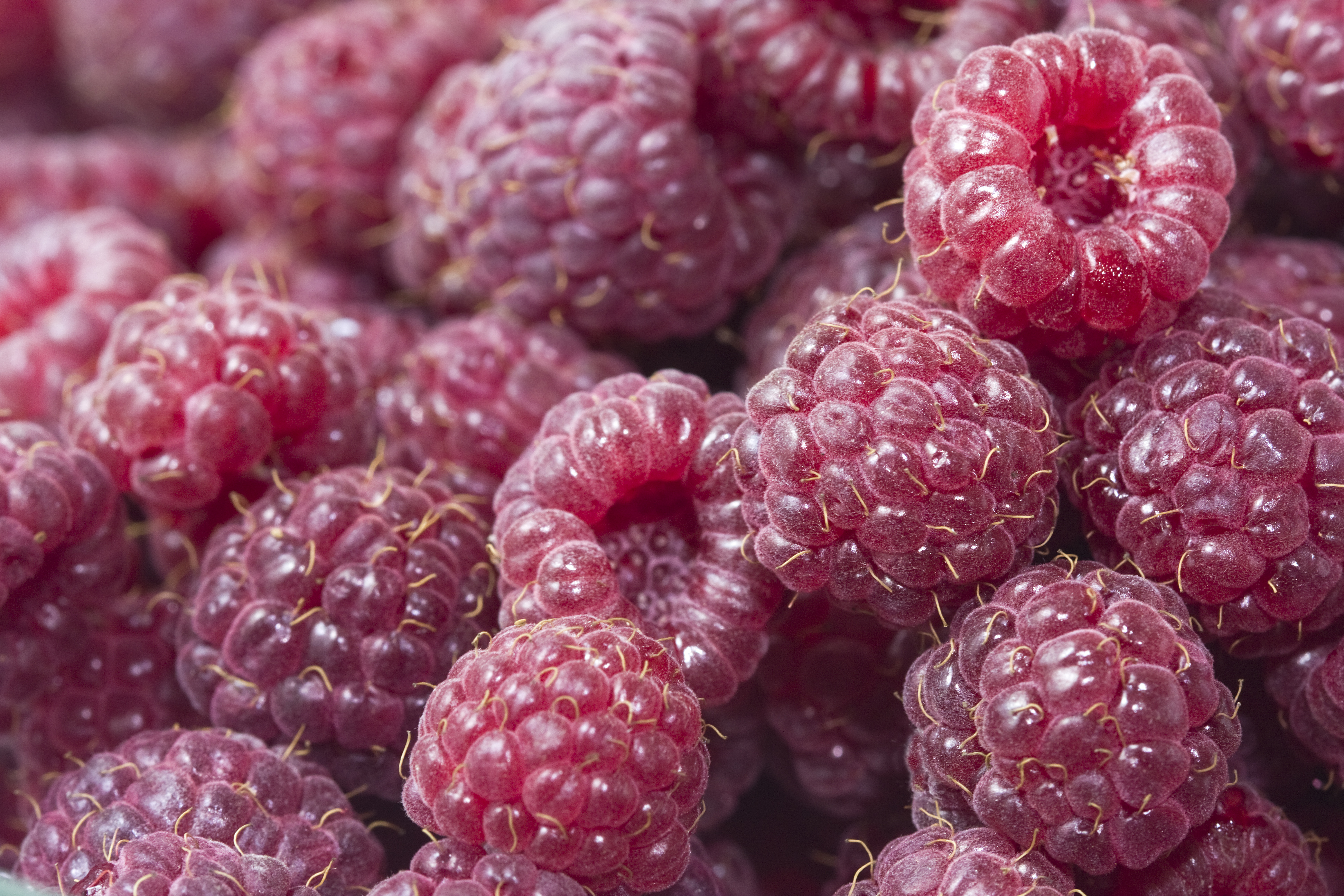 raspberries close